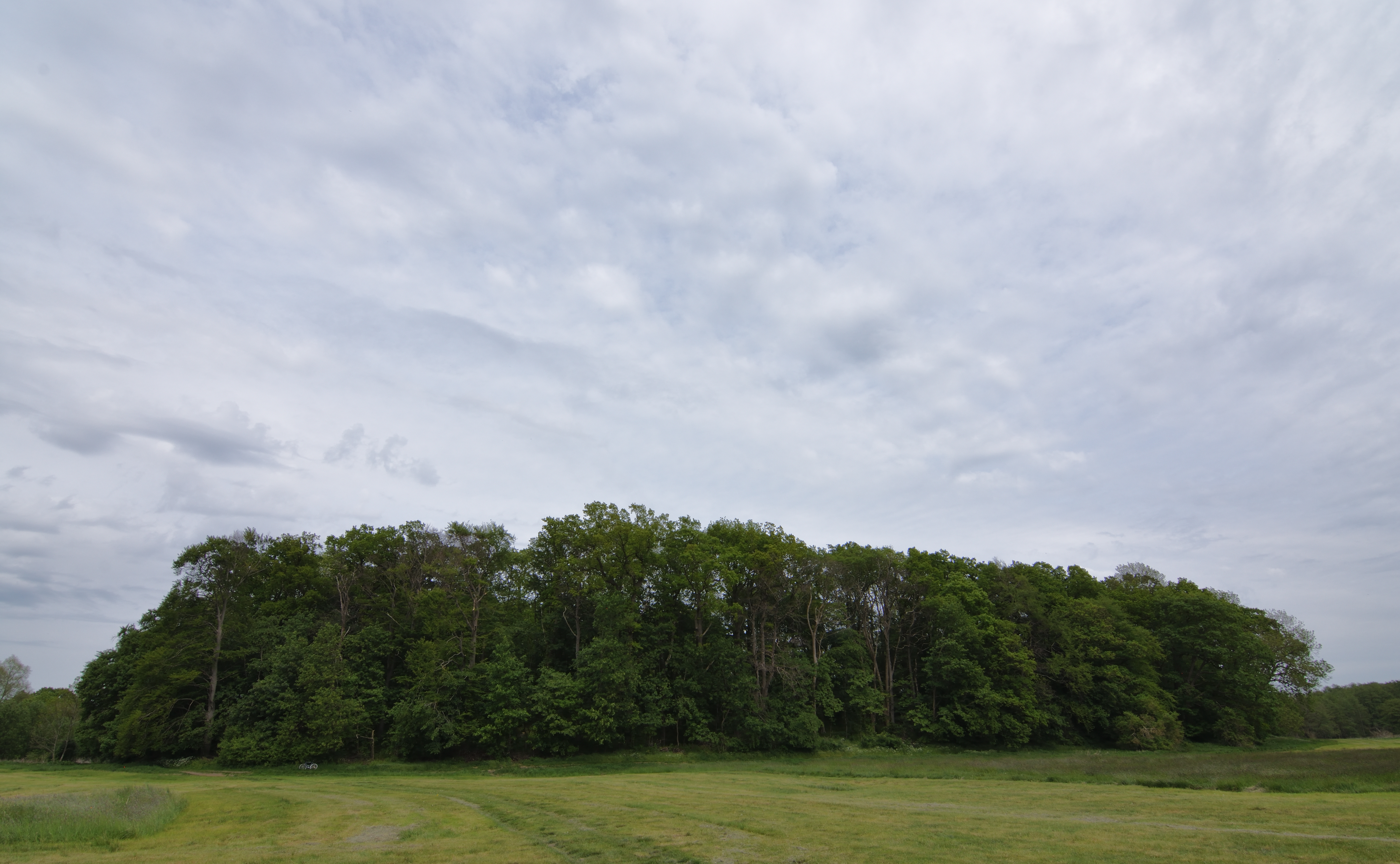 Dorf Mecklenburg, Wall der mittelalterlichen Burgsiedlung